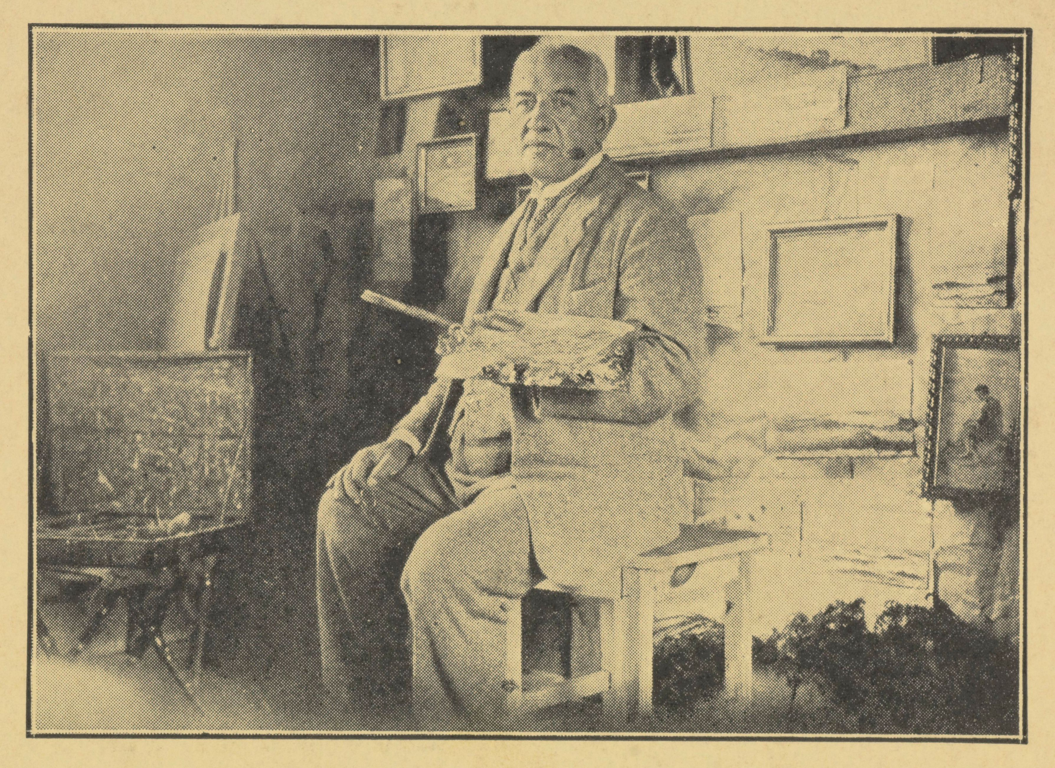 Włodzimierz Nałęcz w pracowni